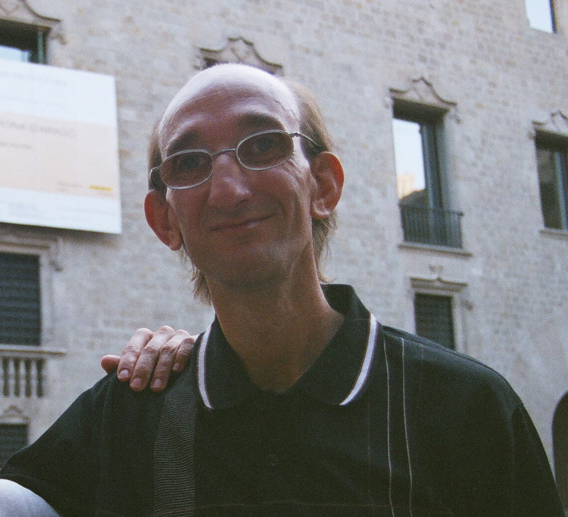 Benito Pocino en la Plaza del Rey de Barcelona